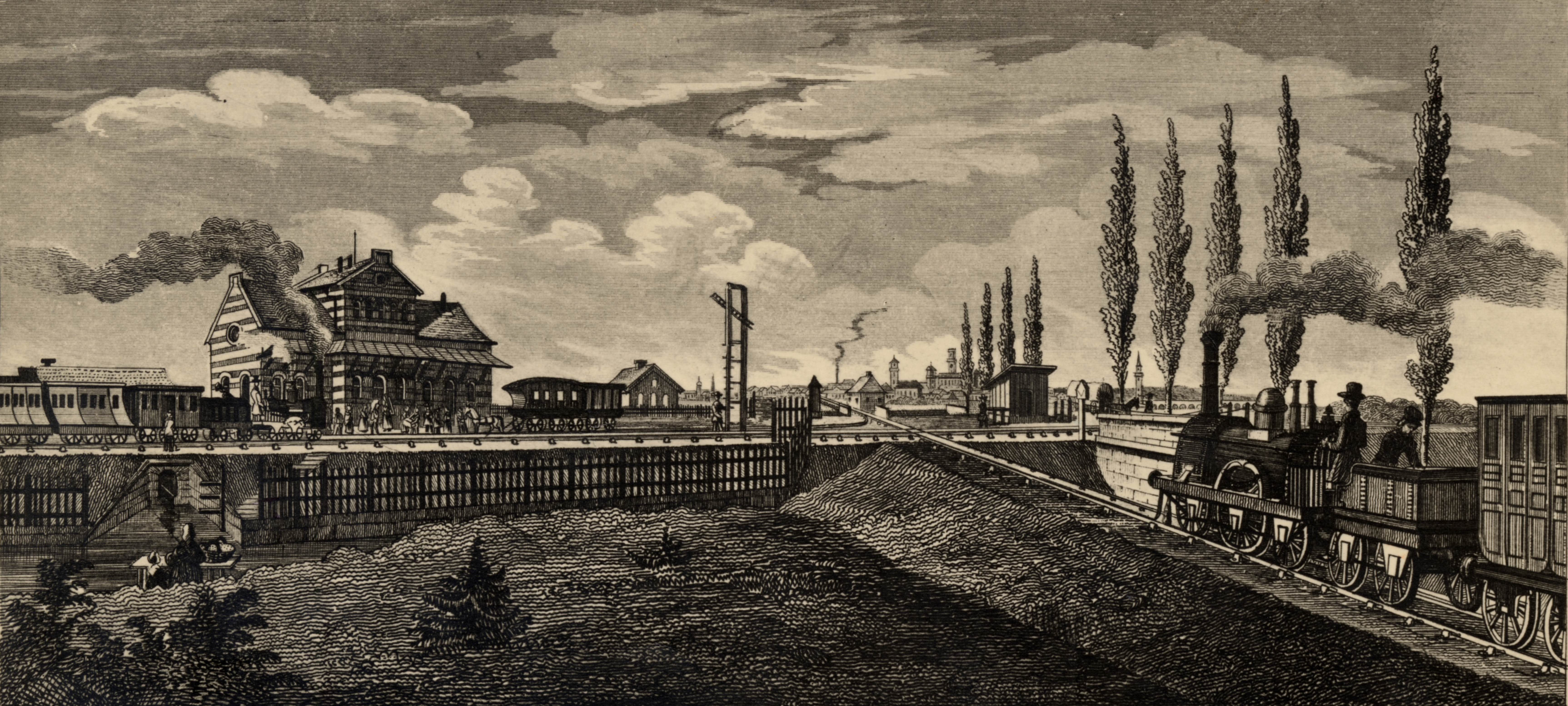 Die Fürther Kreuzung um 1845. Links ein Zug der Ludwig-Süd-Nord-Bahn, rechts die Ludwigsbahn Rechts neben dem Bahnhofgeäude ein Pferdewagen als Zubringer zur Ludwigsbahn, das Gebäude rechts daneben ist vermutlich die Haltestelle/der Bahnhof der Lduwigsbahn (oder ein Schleusenwärterhaus des Ludwigskanals).